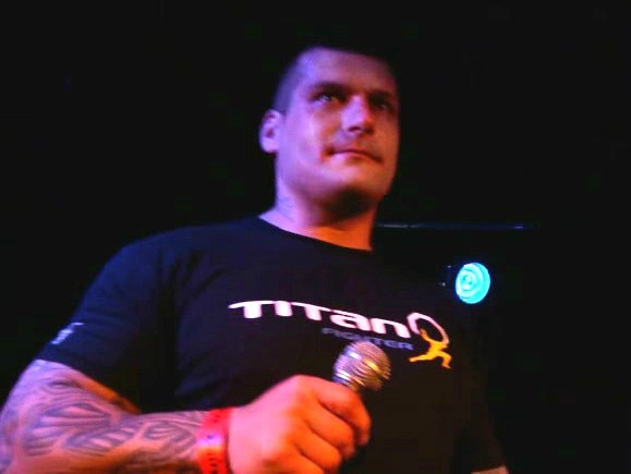 Popek, polski raper i zawodnik MMA.